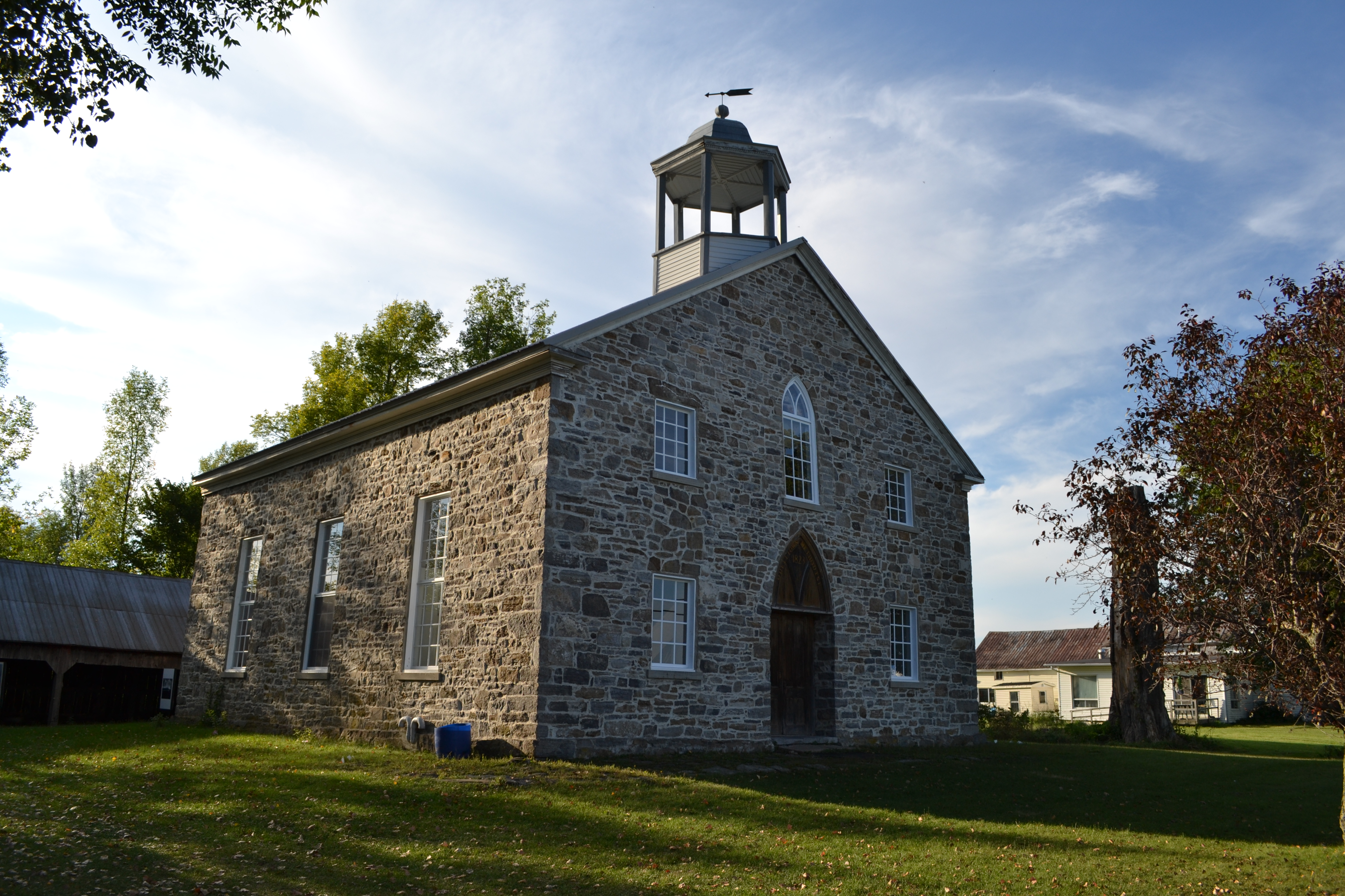 Le site historique de l'Église-d'Odelltown est un ancien ensemble religieux de tradition méthodiste érigé à partir de 1823. Il se compose de l'église Odelltown United et d'anciennes écuries.